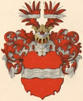 Polli suguvõsa aadlivapp